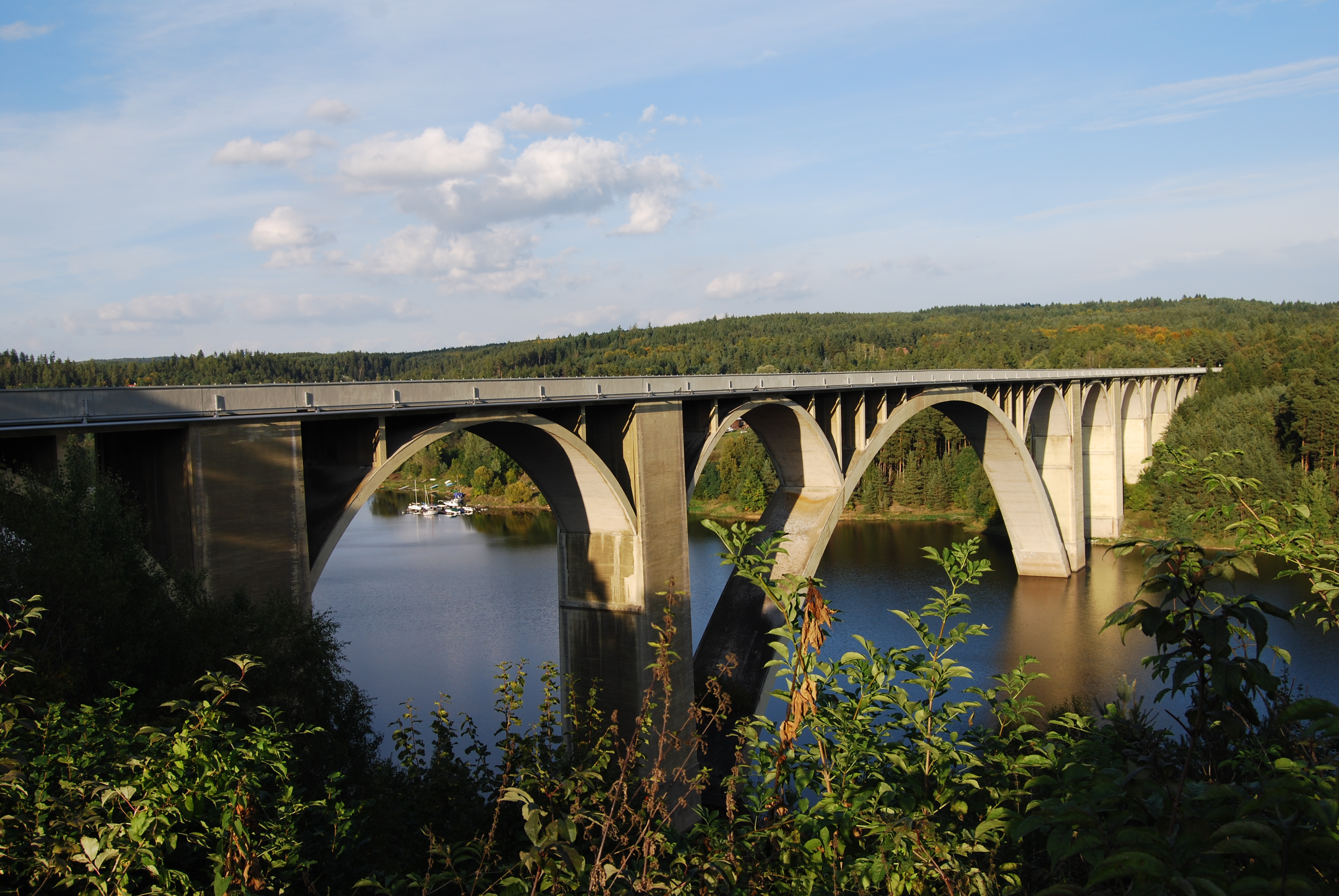 Podolský most.Temešvár (okres Písek). Česká republika.